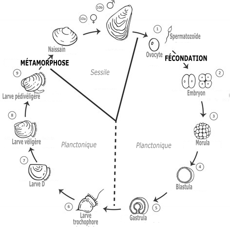 Cycle de vie de l'huître Crassostrea gigas (huître creuse du Pacifique)